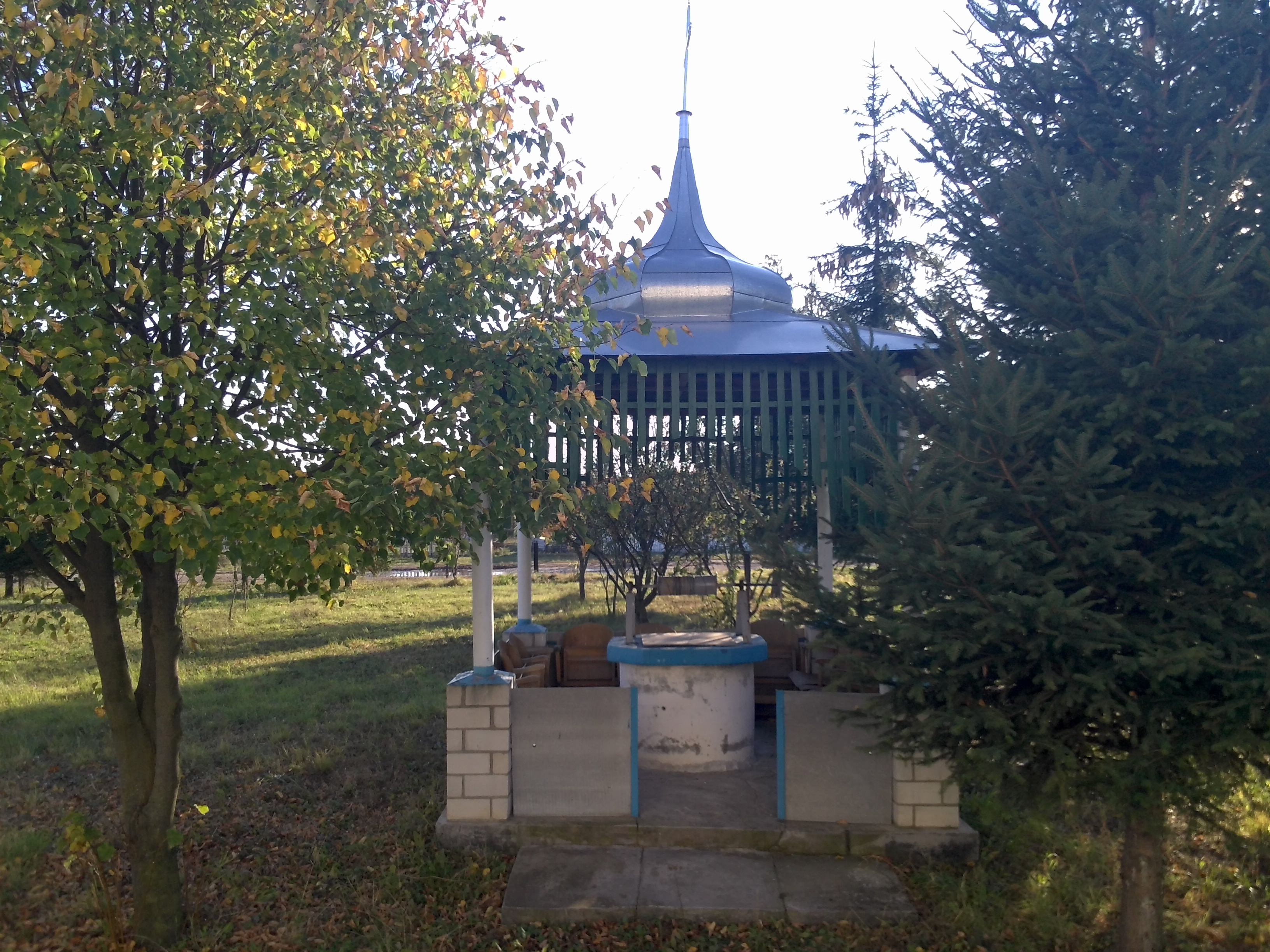 с. Флоріанівка. Церква